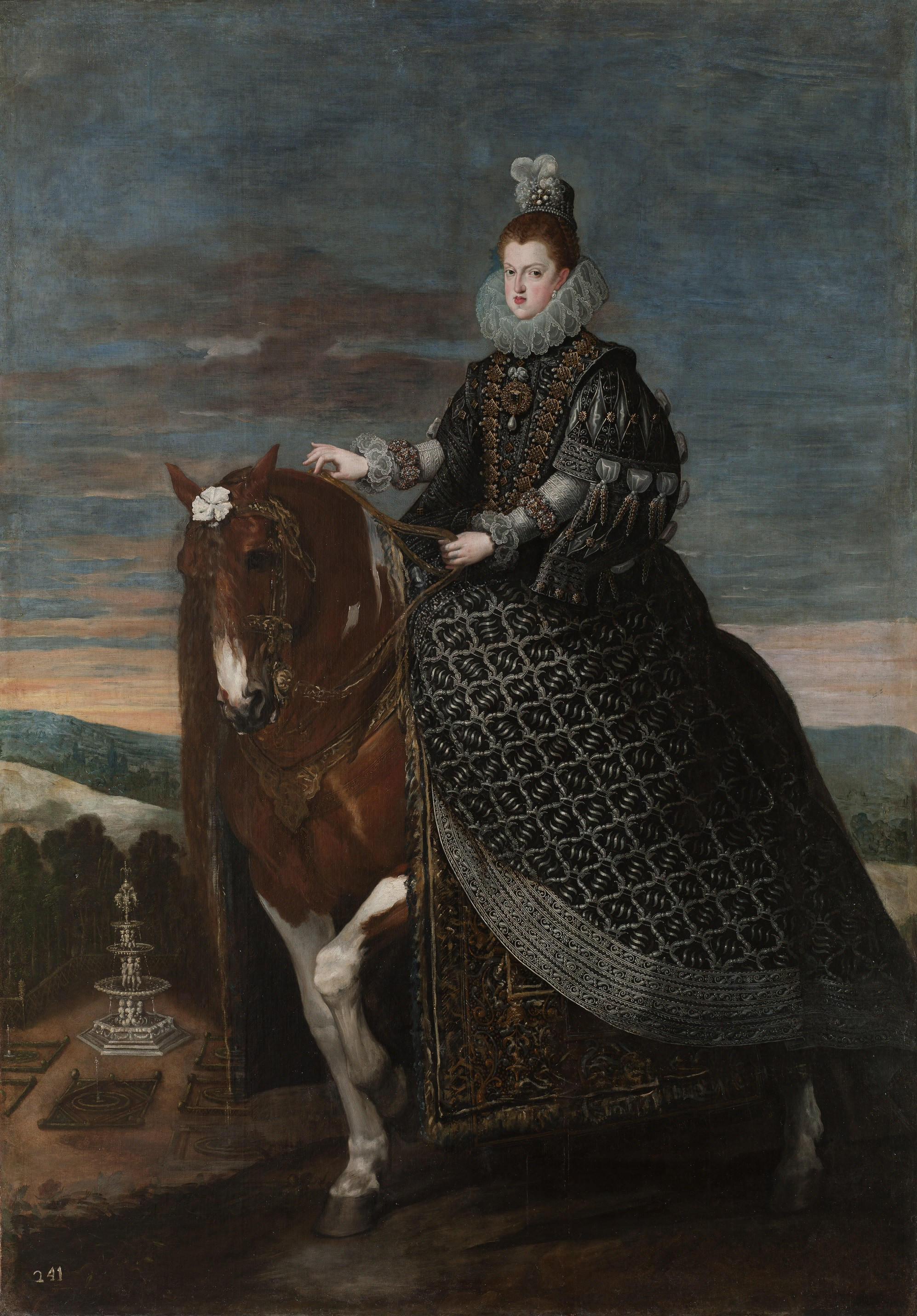 Retrato de la reina Margartita de Austria (1584-1611), que fue reina consorte de España por su matrimonio con el rey Felipe III de España y también la madre del rey Felipe IV.